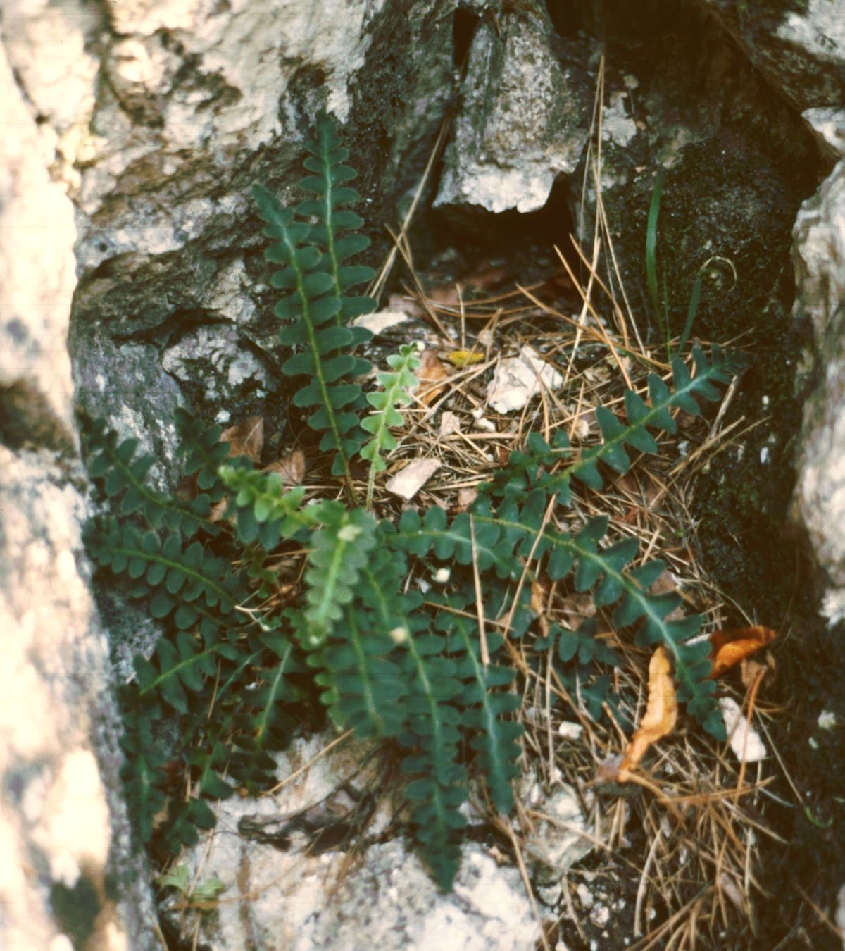 Milzfarn (Asplenium ceterach, syn. Ceterach officinarum), Streifenfarngewächse (Aspleniaceae) - Rumänien/România: Banat, Südkarpaten, Tal des Flusses Cerna bei Băile Herculane, Cheile Ţesnei, Kalk